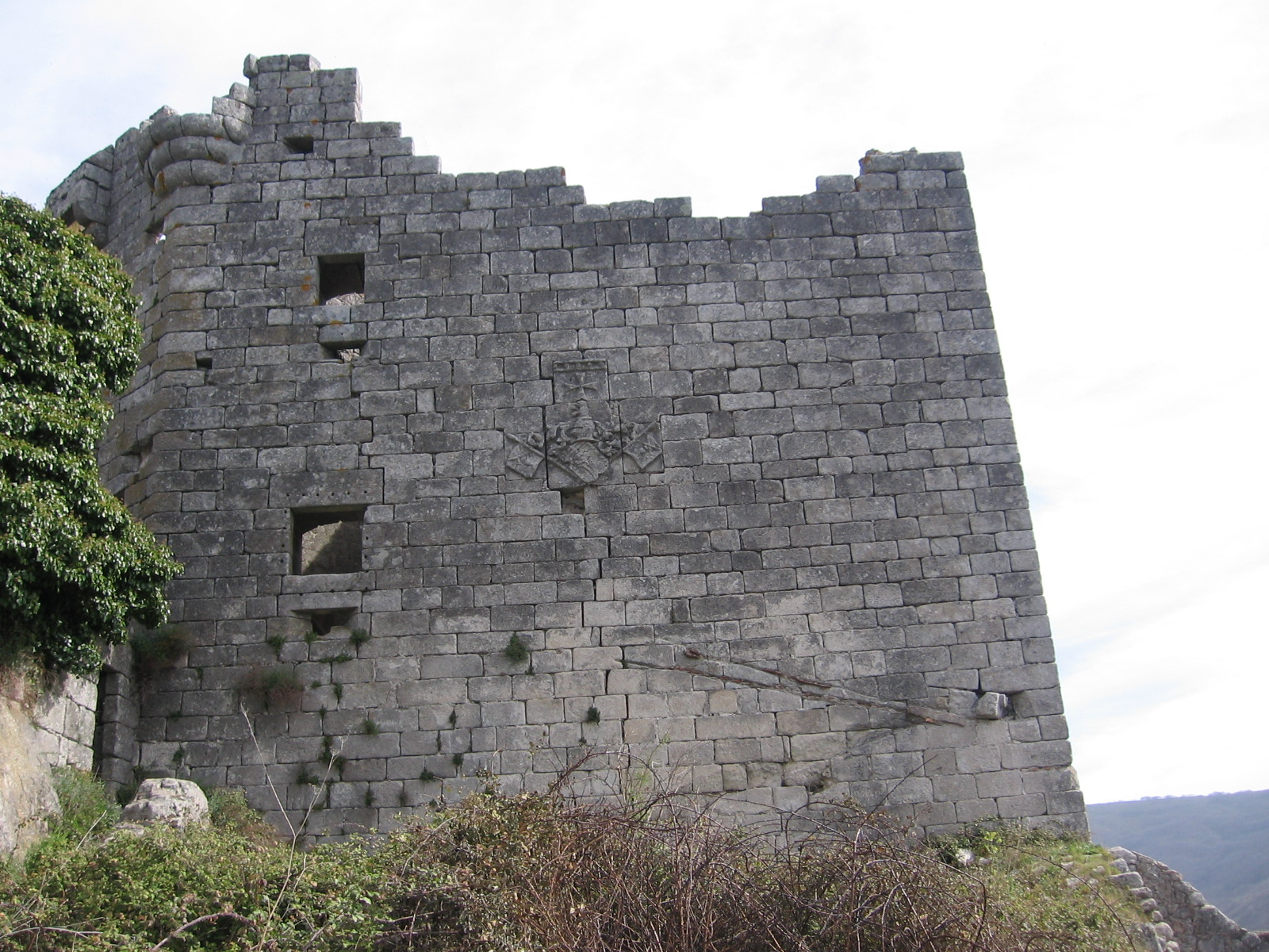 Castelo de Trevejo, Trevejo, Villamiel, Espanha